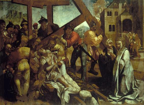 Óleo sobre madeira de carvalho 106,3 x 141,5cm